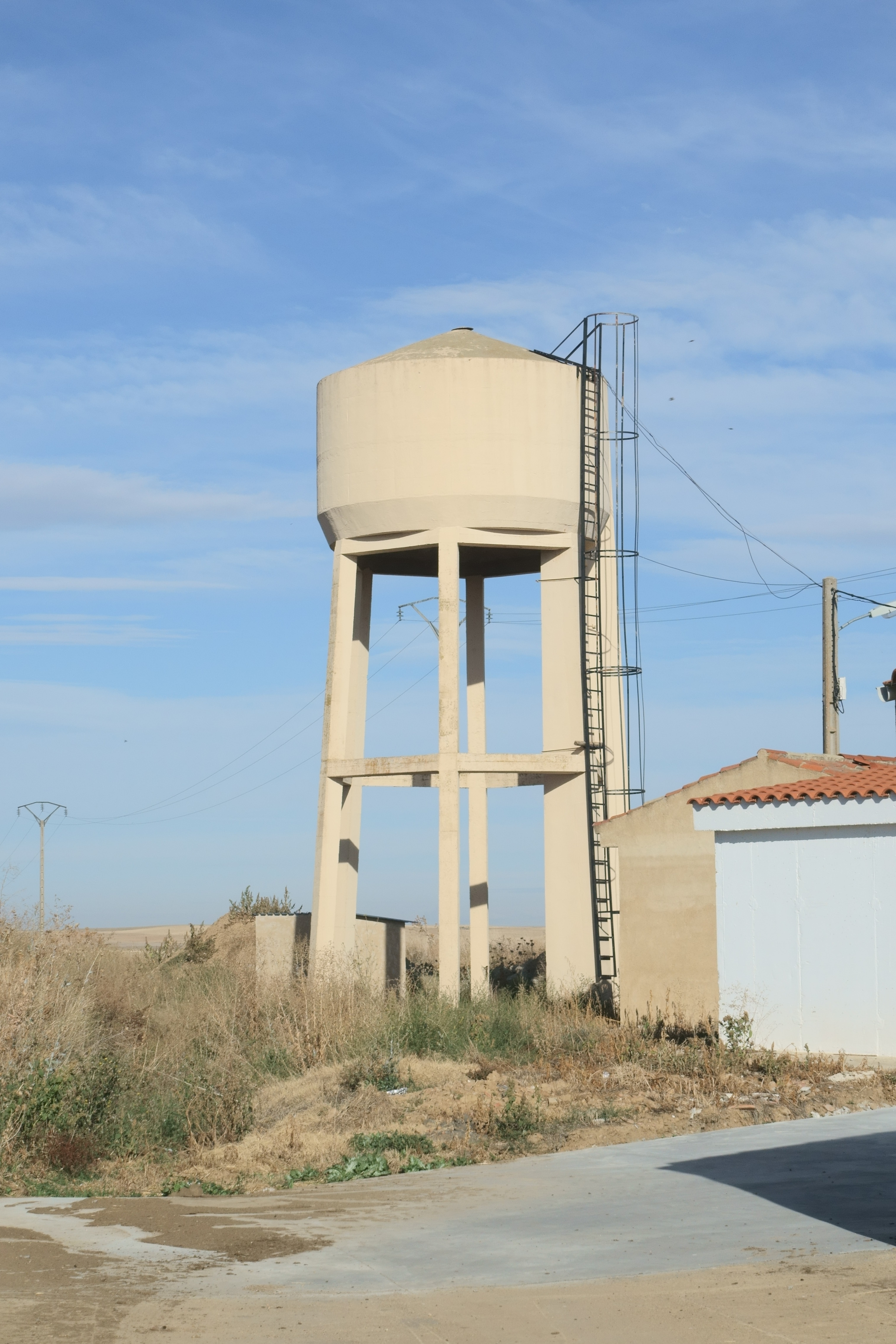 Depósito de agua en San Martín de Valderaduey (Zamora, España).